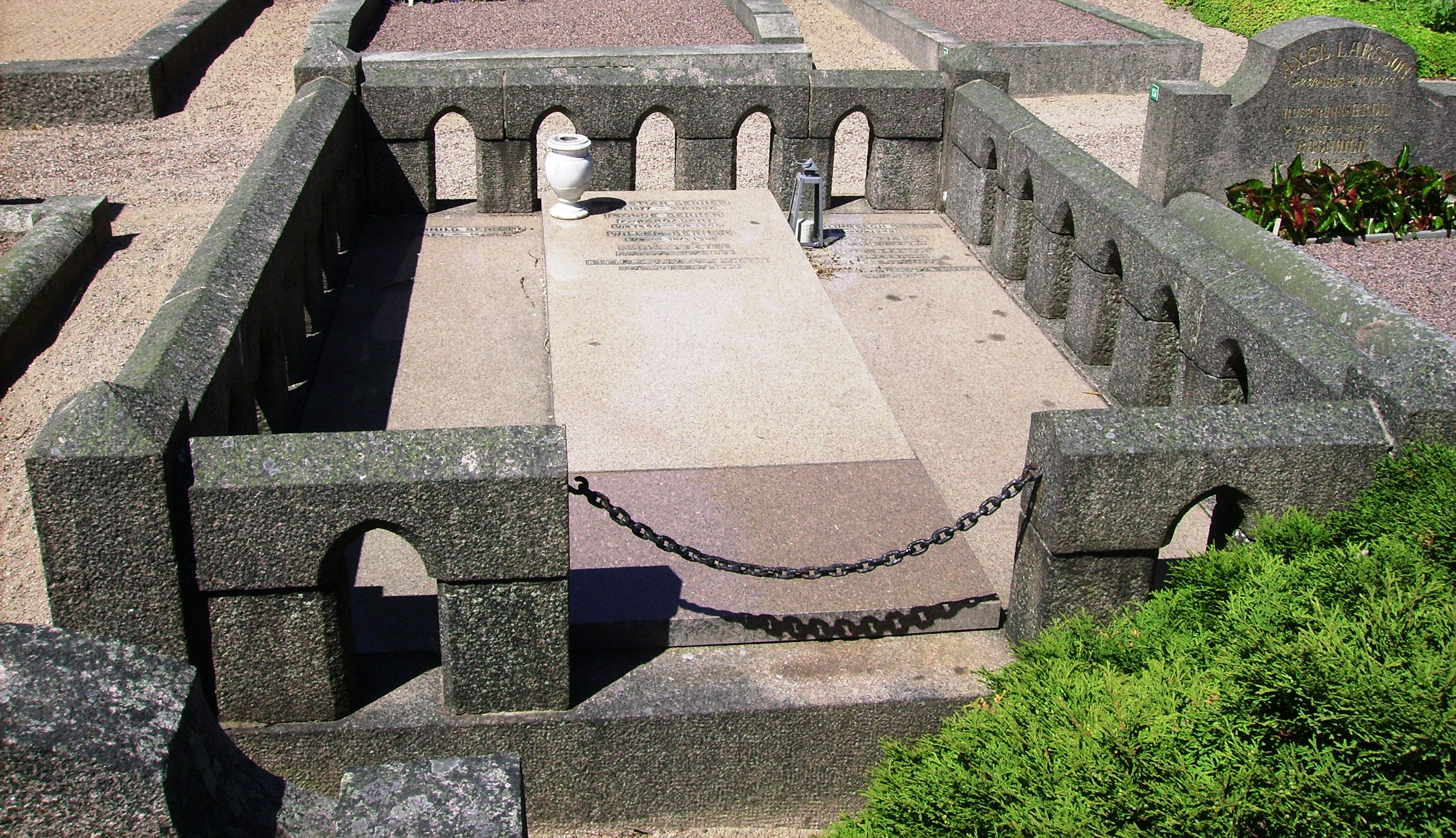 Grave of Christian Berner at Östra kyrkogården in Gothenburg